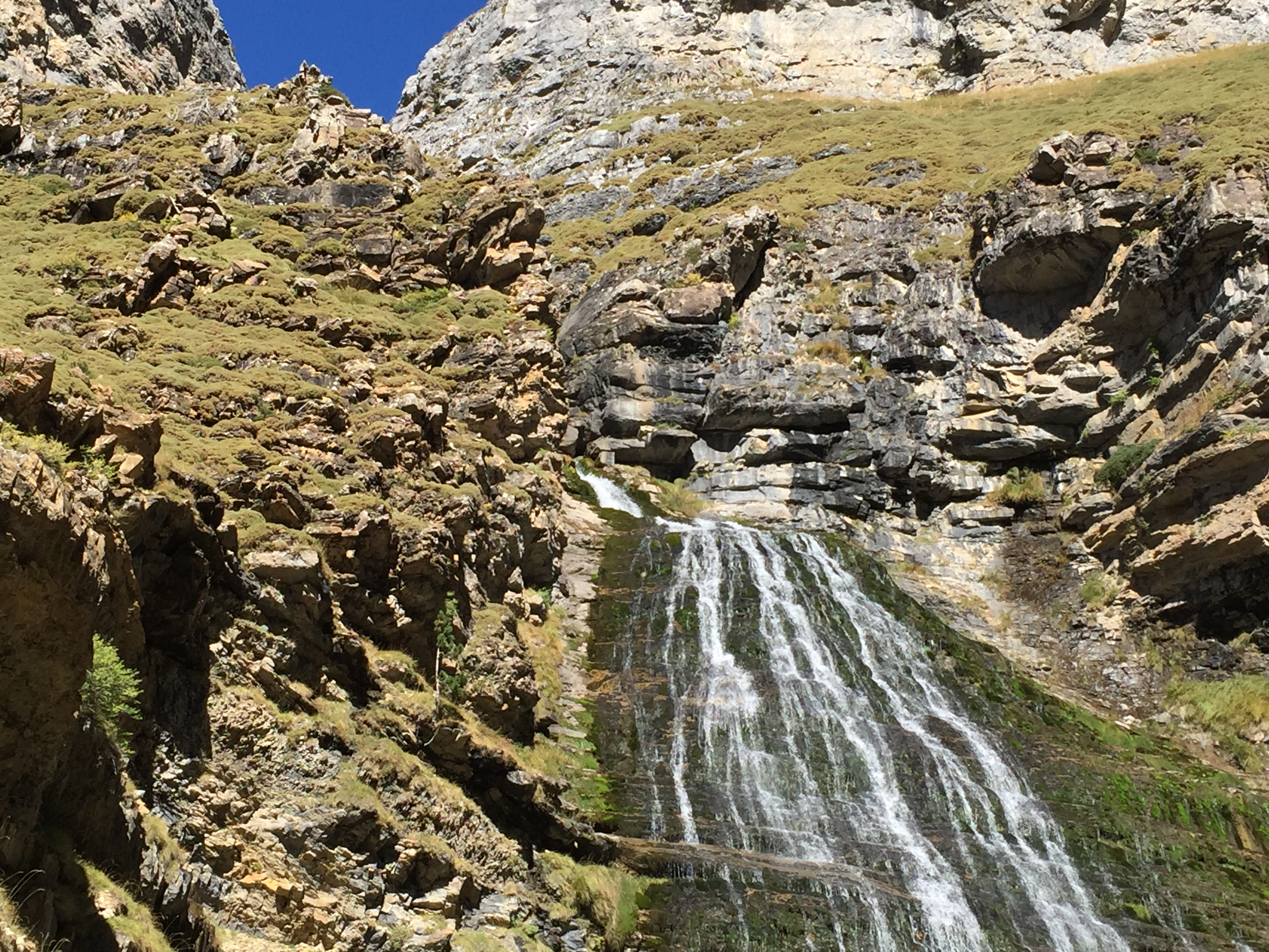 Rio Arazas. Cola del Caballo Parque Nacional de Ordesa y Monteperdido Torla-Ordesa (Huesca)